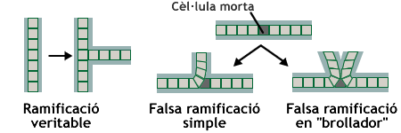 Ramificacions dels cianobacteris